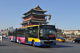 拍摄于前门的44路旧车DD6180S01